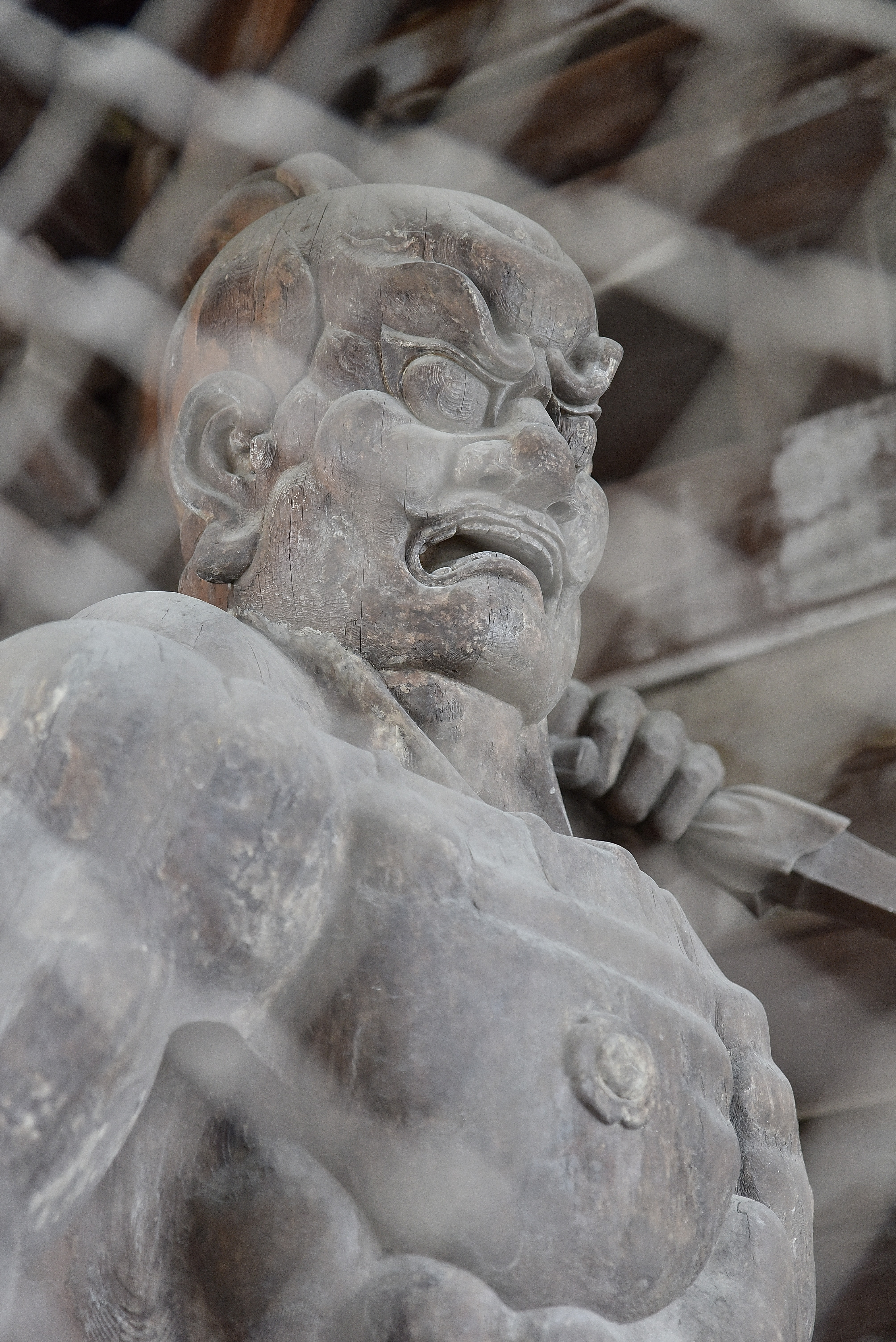 南大門の仁王像 Nikon D750